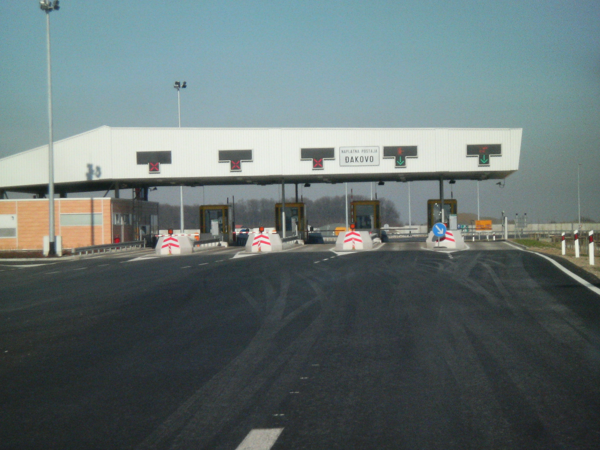 Mautstation an der A5, Kroatien